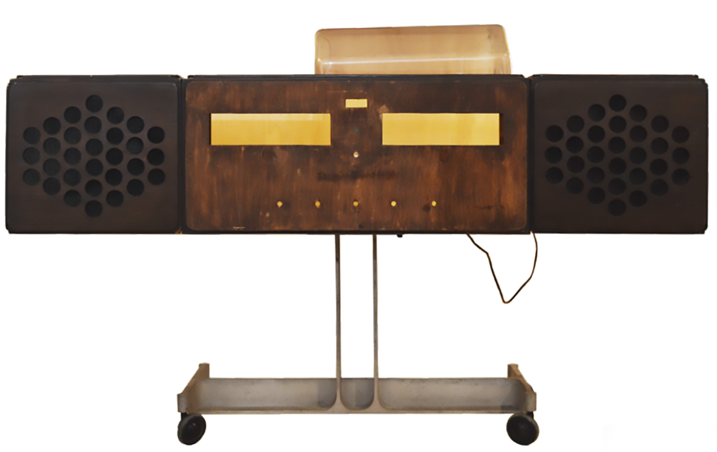 Vèneto: RR 126 scocca in legno scattata durante la mostra dei Castiglioni di Pordenone, 2019